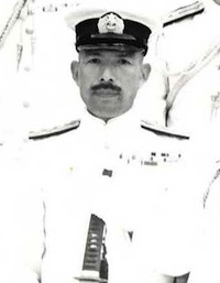 朝倉豊次海軍少将